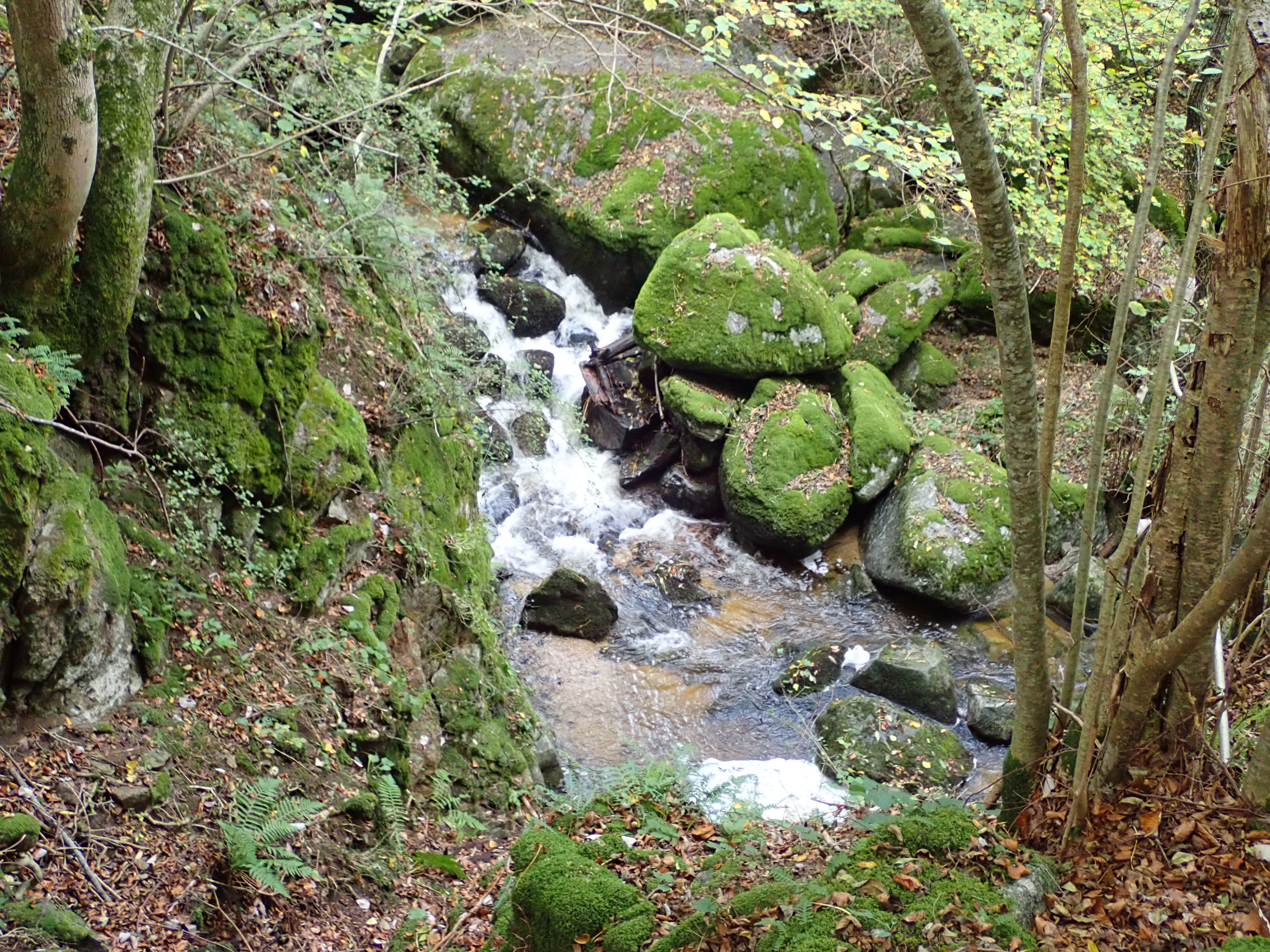 Le ruisseau du Piou à hauteur de Fabrèges (altitude du lieu : environ 900 m). Le ruisseau, qui nait sur le plateau de l'Aubrac à une altitude de 1 300 m, s'encaisse plus en aval dans des vallées profondes, dont celle de Fabrèges, et suit un cours turbulent avec de nombreuses cascades.